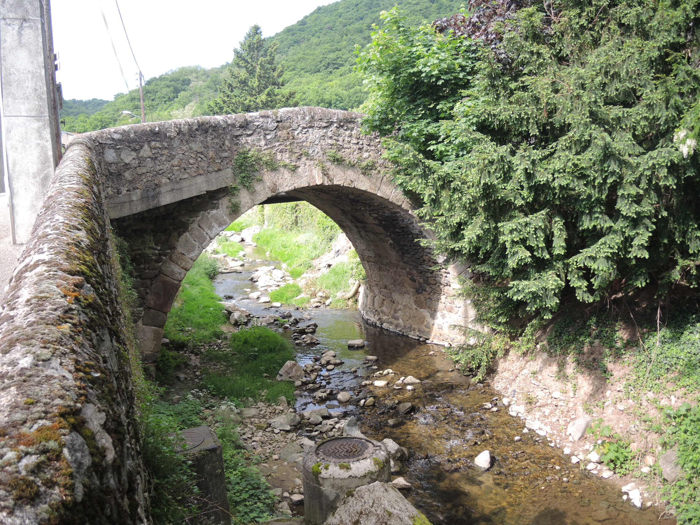 Peyraud détail